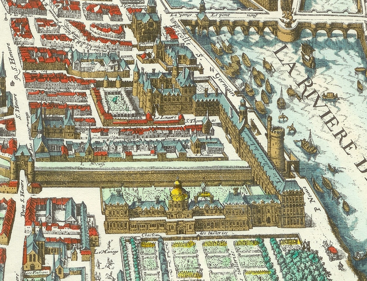 Le Louvre, le palais des Tuileries et la Grande Galerie en 1615. Extrait du plan de Mérian.